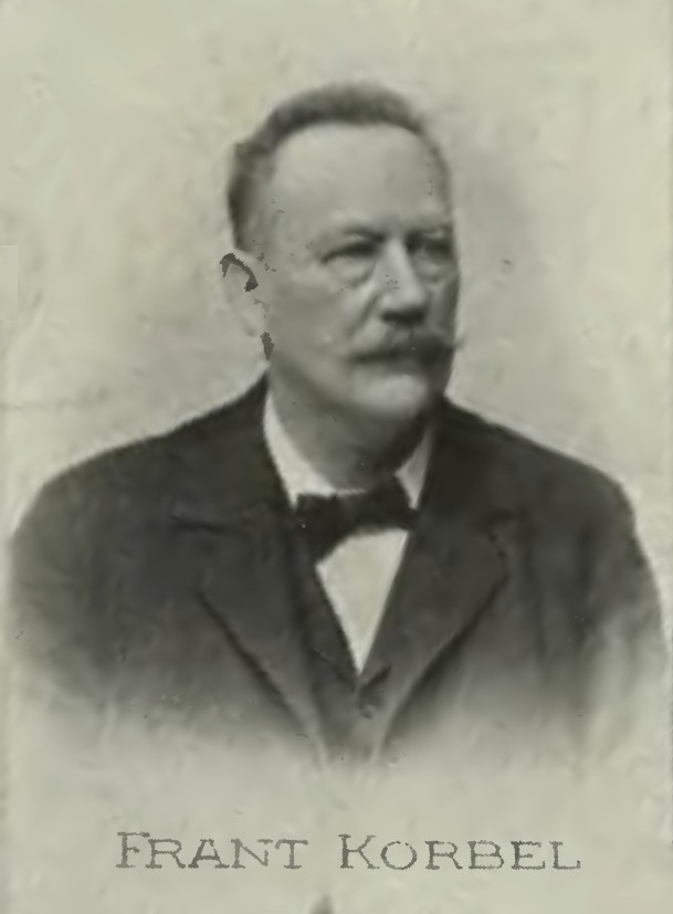 Portrét – František Korbel (1831 - 1920), Česko-americký milionář a podnikatel.